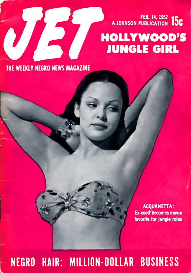 Acquanetta